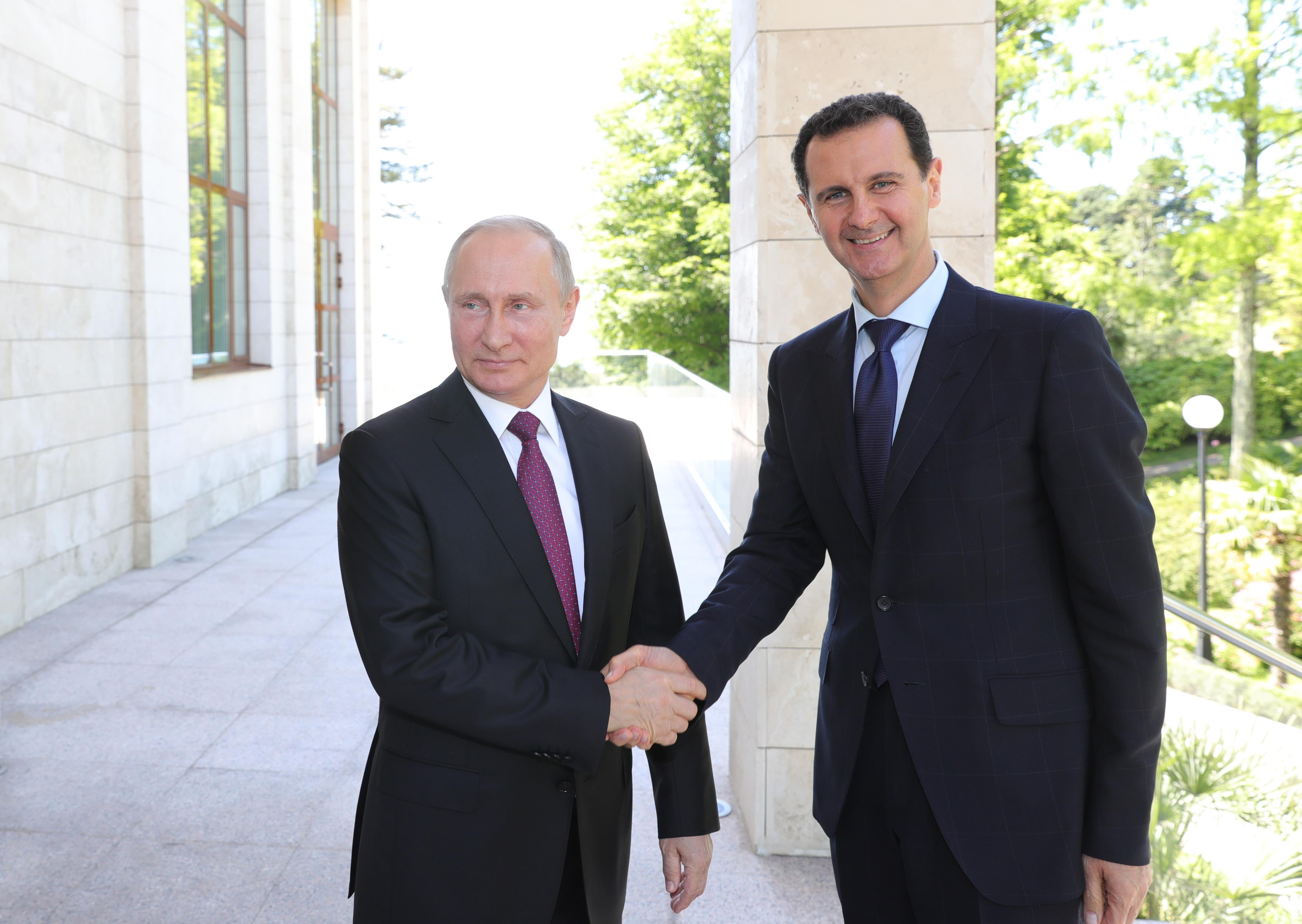 Президент России Владимир Путин с Президентом Сирии Башаром Асадом